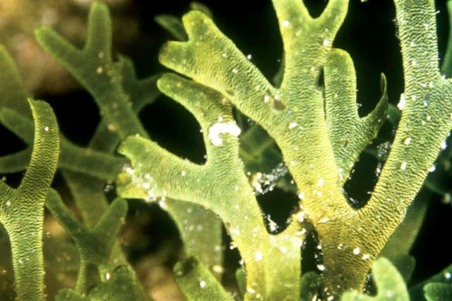 Area Marina Protetta Capo Gallo, Palermo, Sicily Dictyota dichotoma